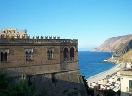 Castelllo Ducale Ruffo This is a photo of a monument which is part of cultural heritage of Italy.